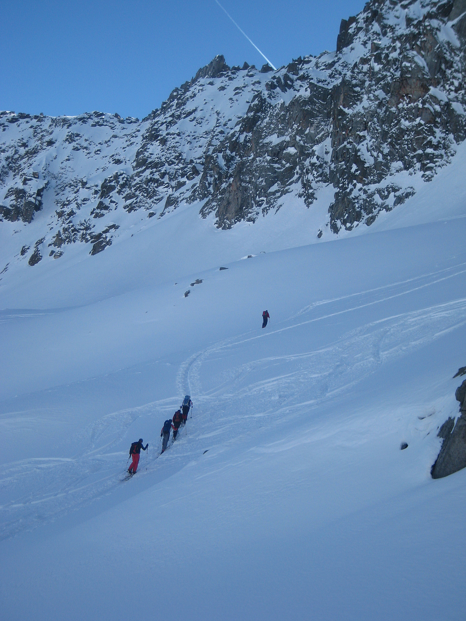 Skitourenläufer im Aufstieg am Piz Badus, Graubünden